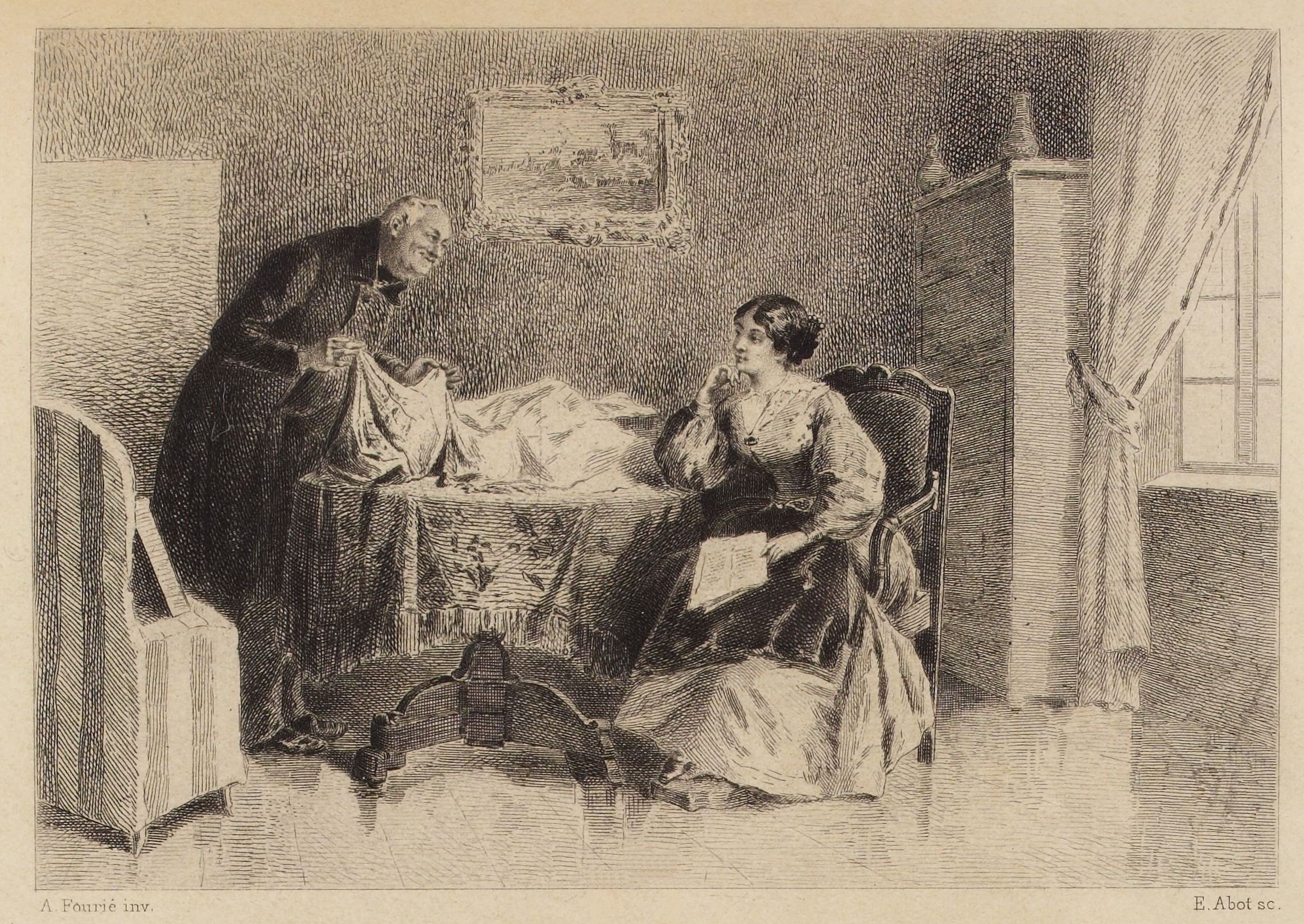 Illustration d'Albert Fourié pour le livre Madame Bovary de Flaubert, gravé à l’eau-forte par Eugène Abot et Daniel Mordant - [1]